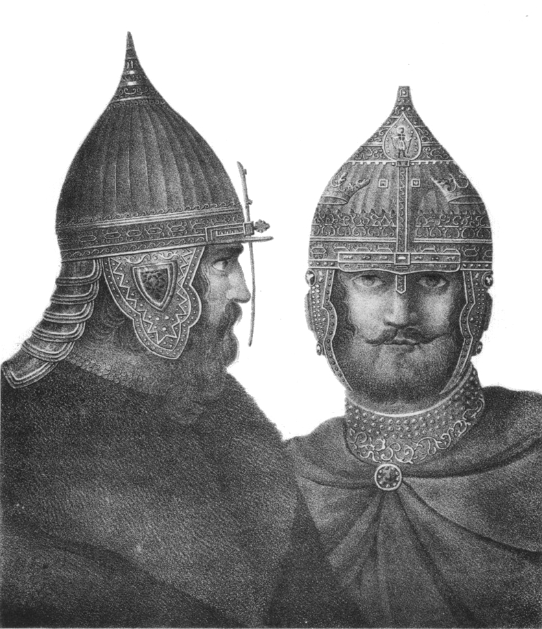 Русское вооружение с XIV до второй половины XVII столетия. Шапки железные.